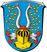 Wappen von Kirtorf